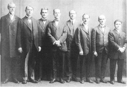 Gli otto membri del consiglio direttivo della Watchtower Society condannati nel 1918. Da sinistra: W. E. Van Amburgh, J. F. Rutherford, A. H. Macmillan, R. J. Martin, F. H. Robison, C. J. Woodworth, G. H. Fisher, G. De Cecca